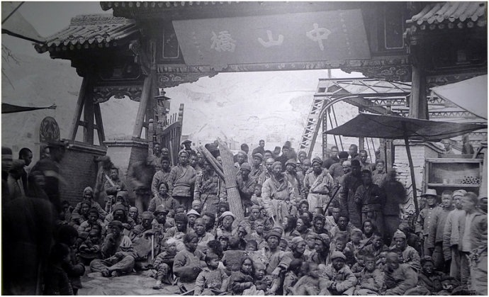 兰州饥民在中山桥乞食状况